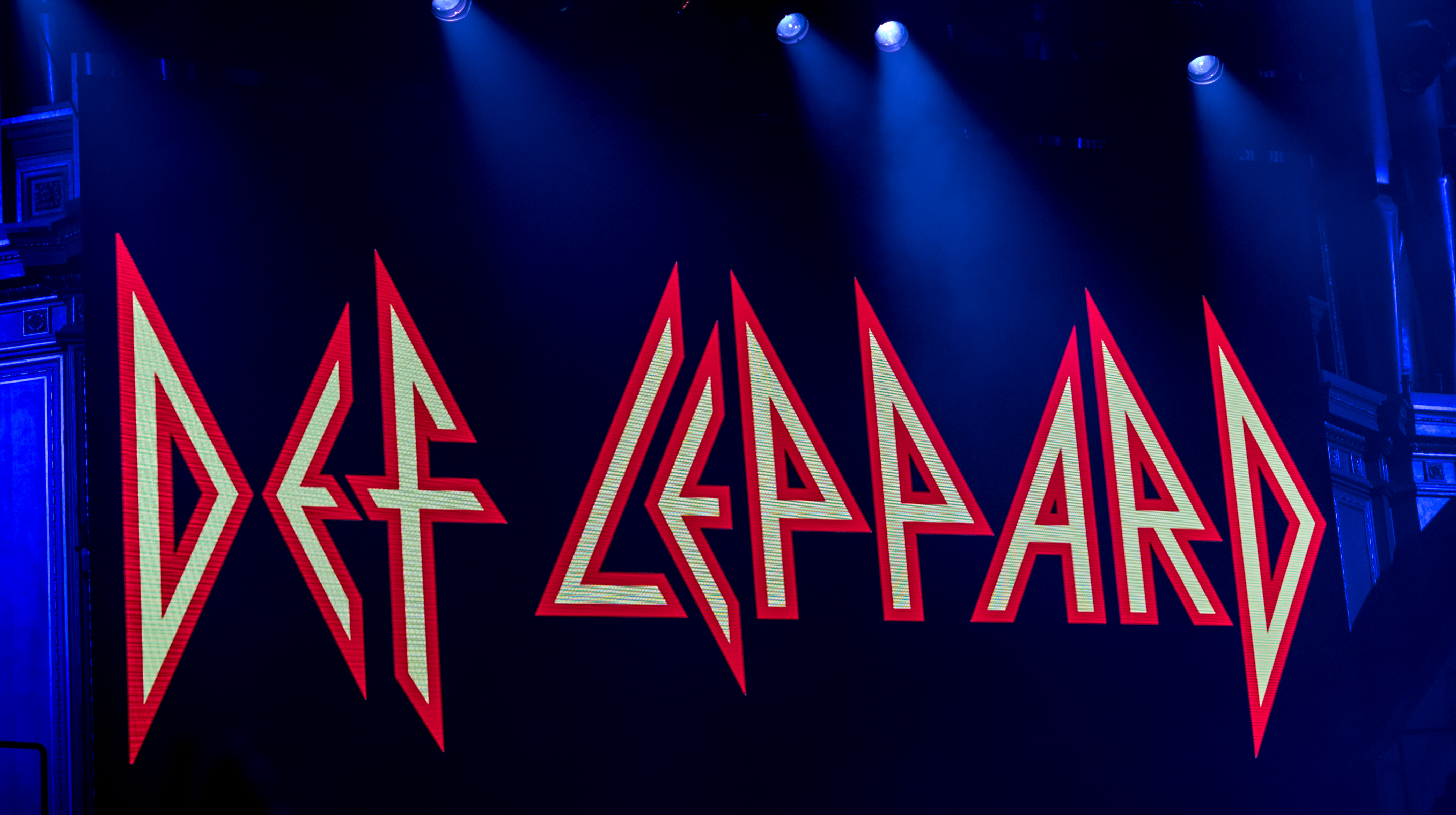 DefLepRAH250318-51